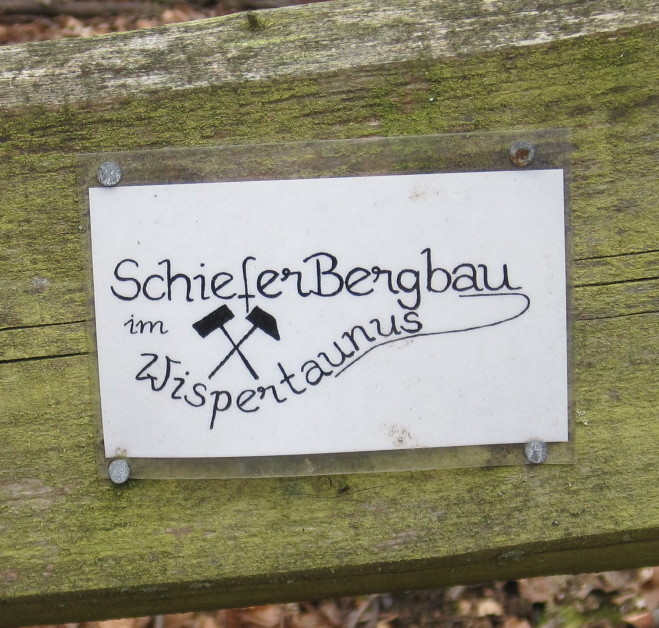 Zeichen des Geopfades "Schieferbergbau im Wispertaunus" zwischen Heidenrod-Zorn und Heidenrod-Nauroth im Taunus.